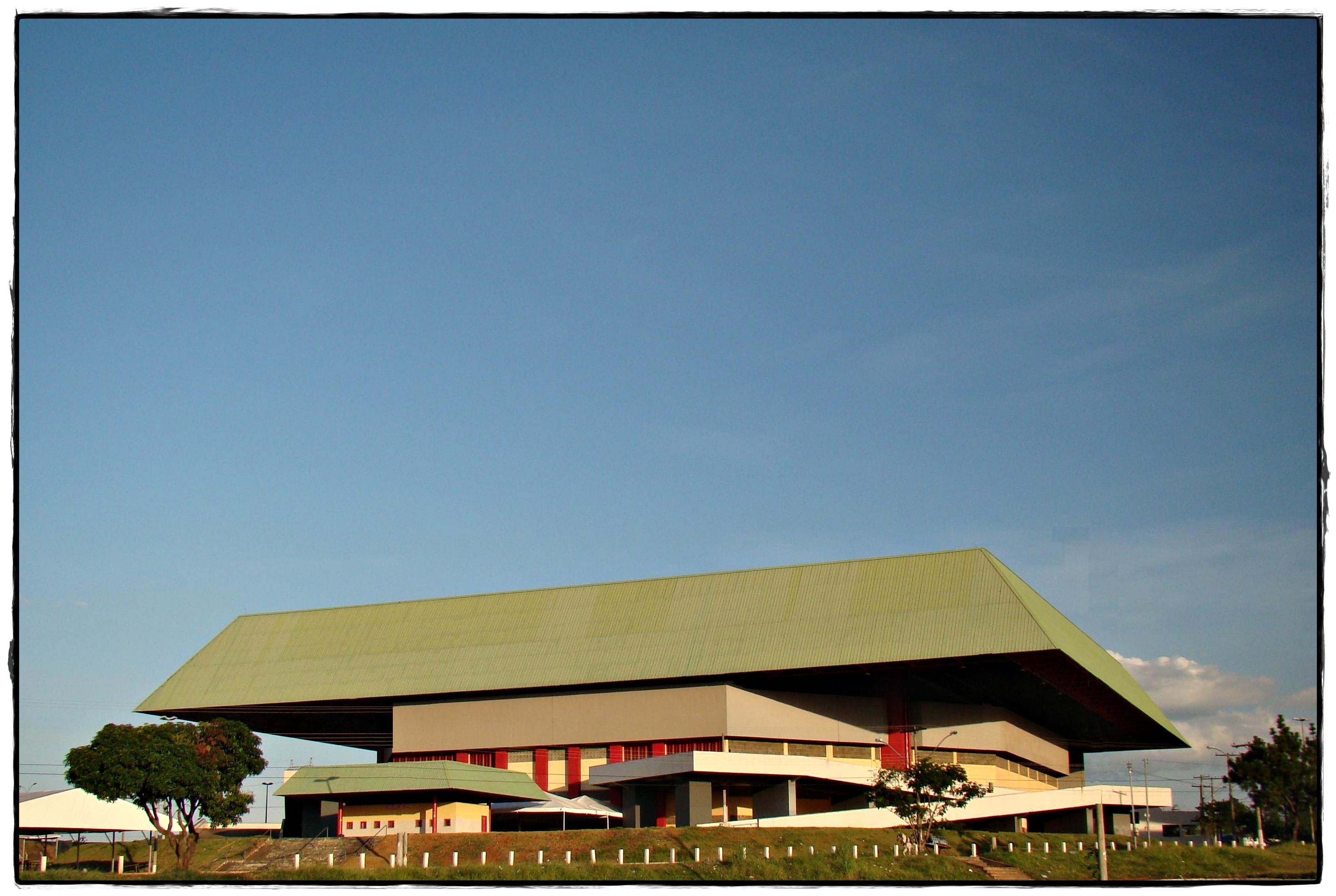 Ginásio Goiânia Arena - Goiânia - Goiás - Brasil